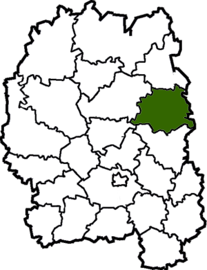 Malynskyi-Raion map